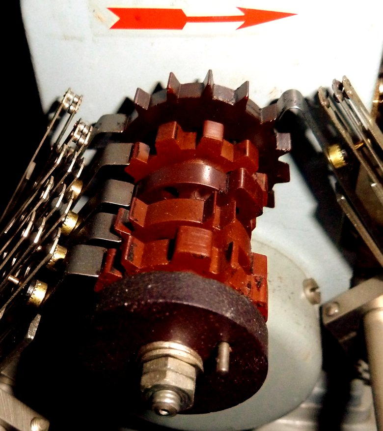 RSM 607/46a Nockenscheiben mit Federkontakten